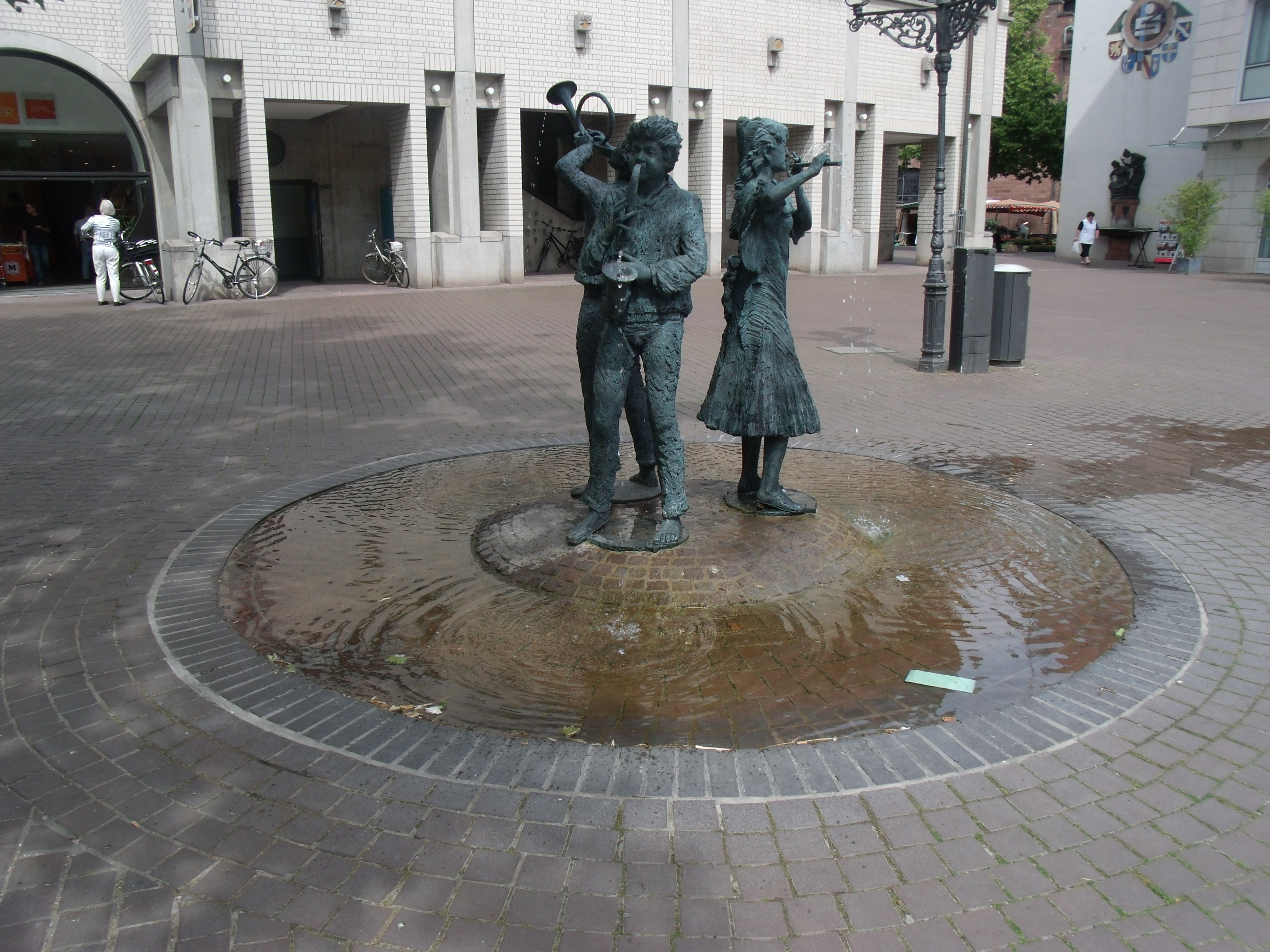 Fonteintje met beeldje in Ettlingen.